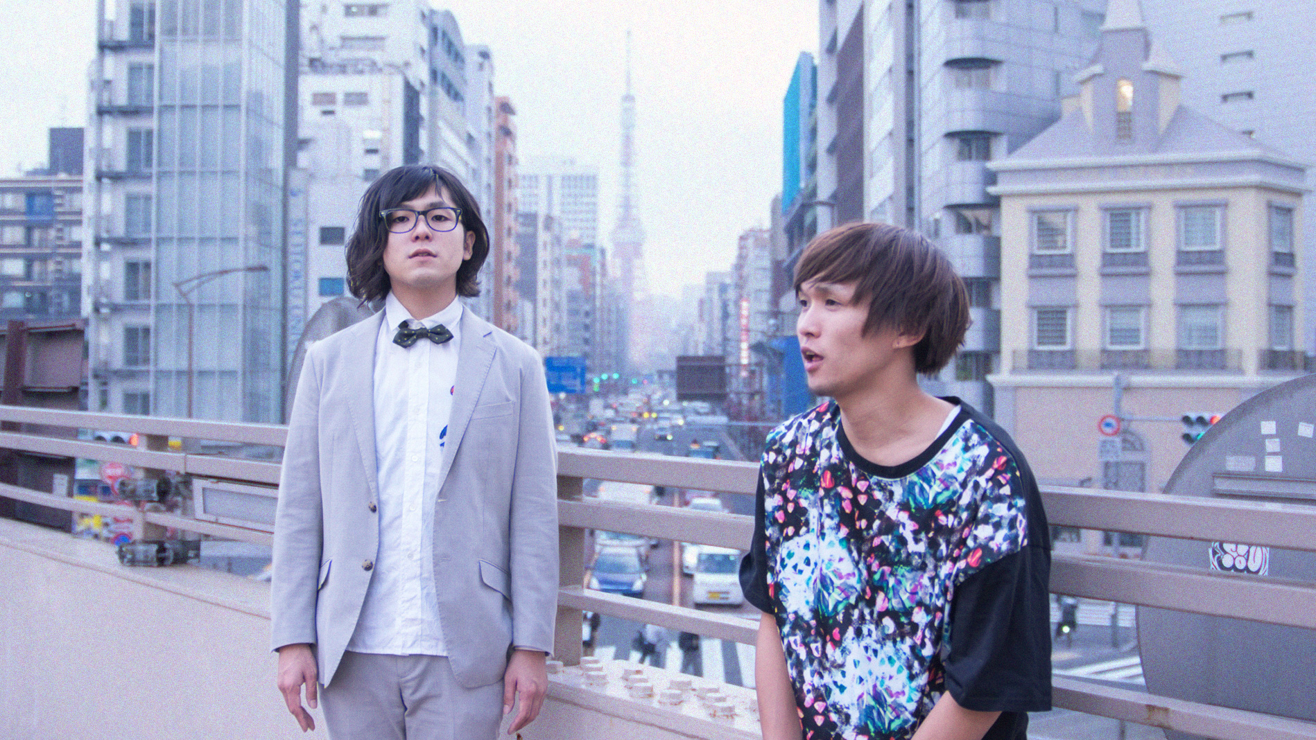 FOOL PHOOL アーティスト写真